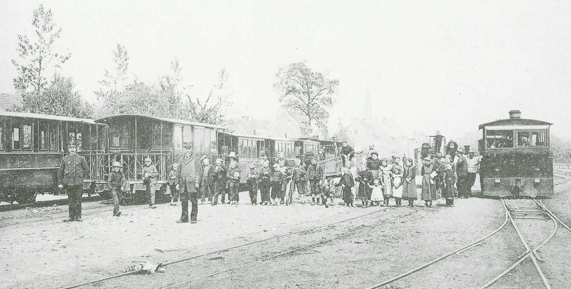 Tramstelplaats - Kapelstraat - Ursel - Knesselare - Oost-Vlaanderen - Vlaanderen - België